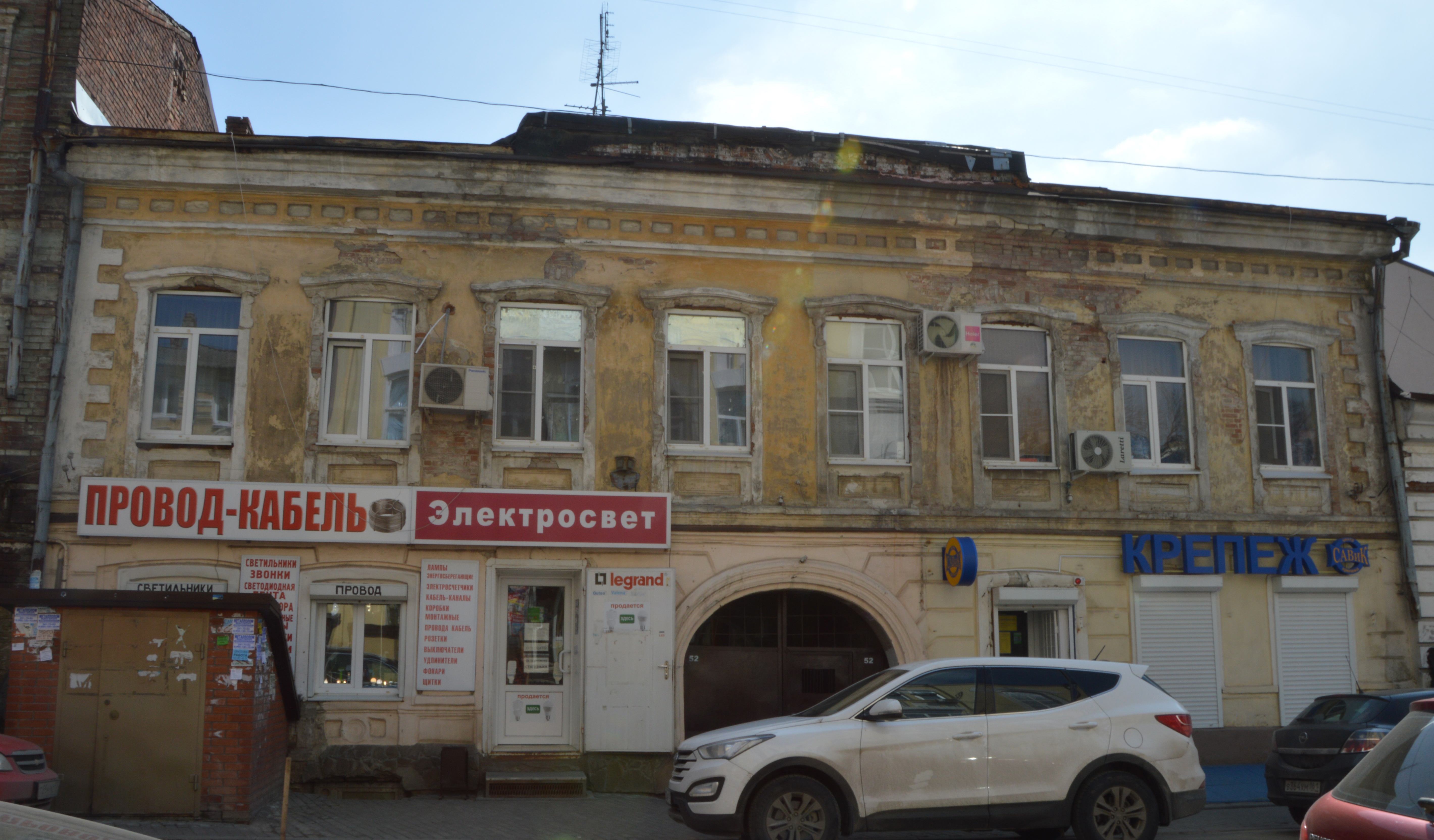 Здание города Ростова-на-Дону